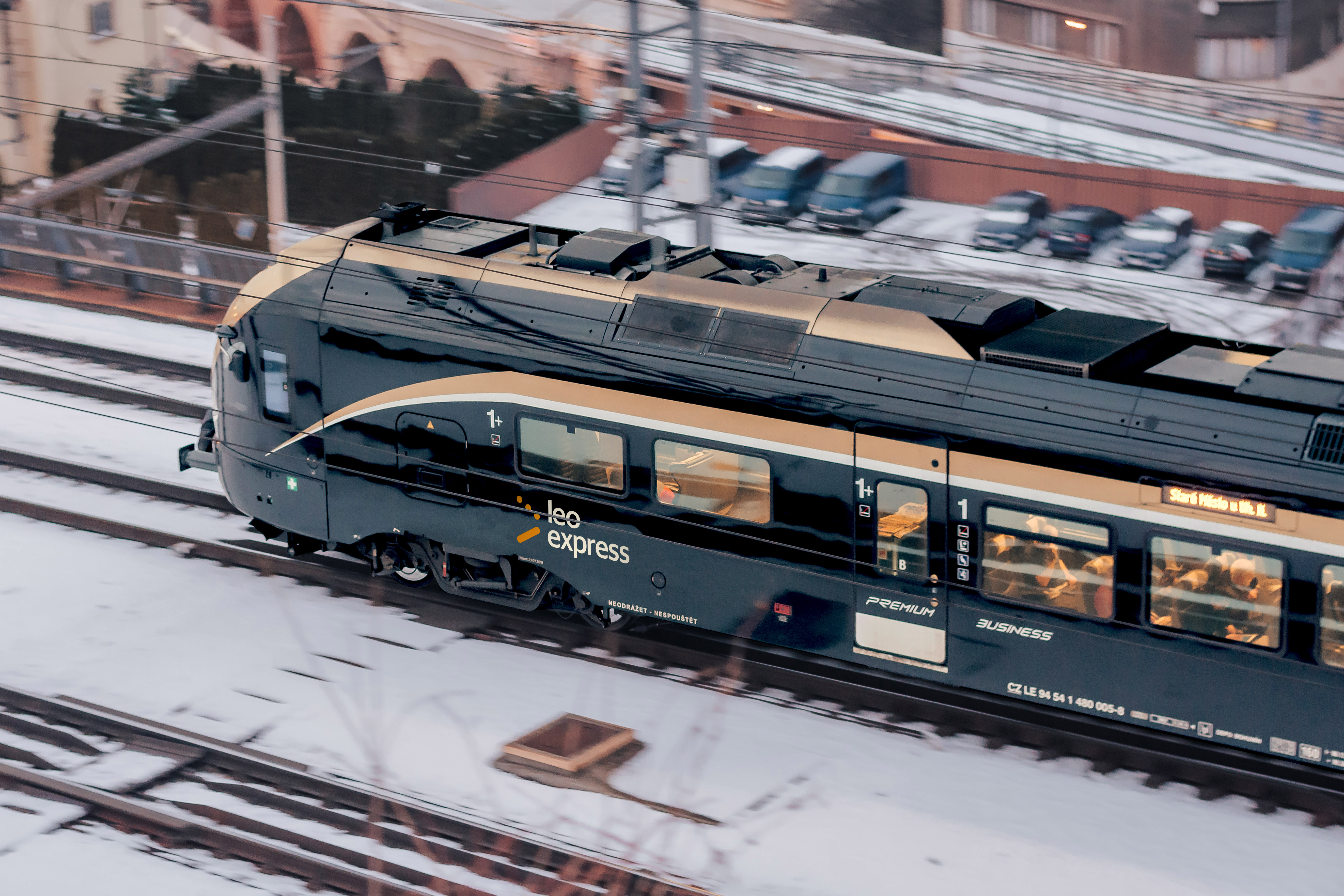 Vlak společnosti Leo Express